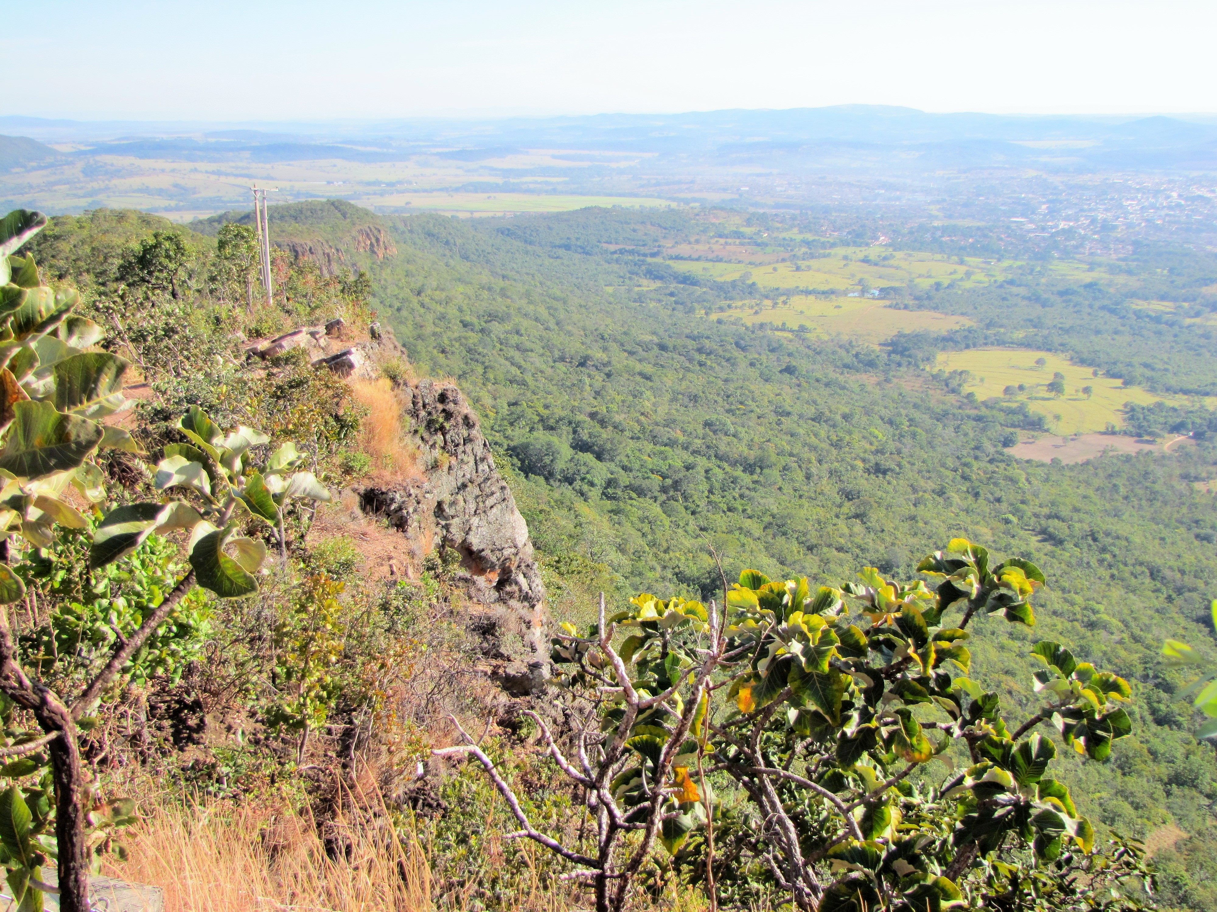 Jaraguá - GO - Brazil